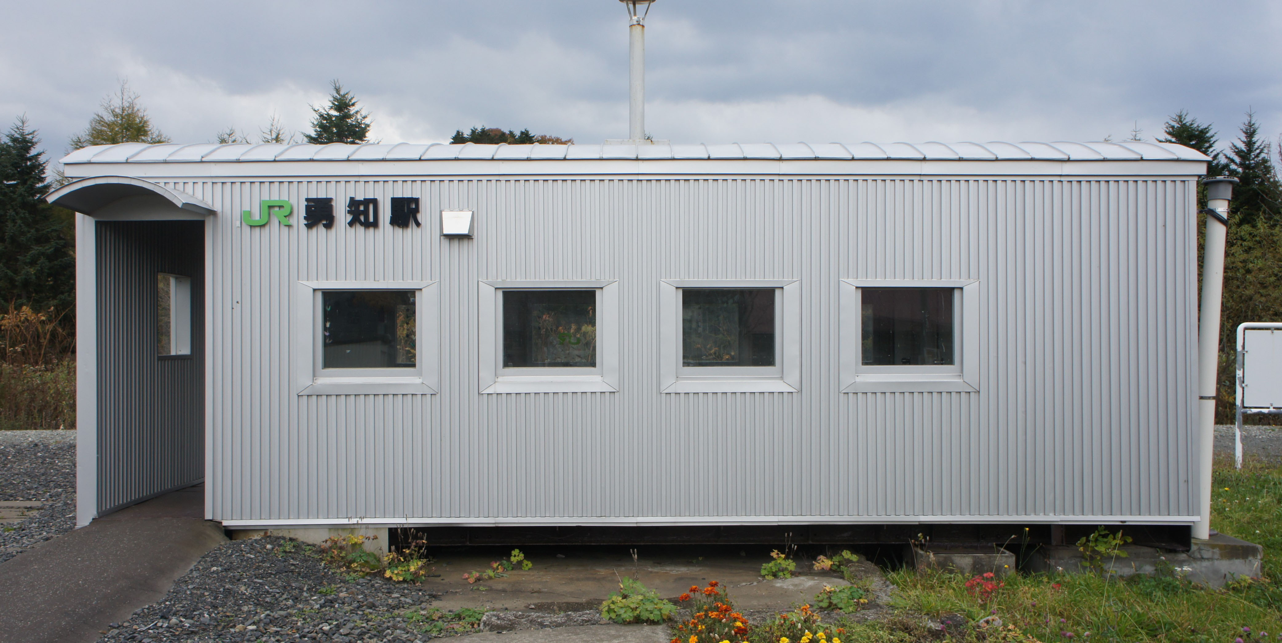 JR宗谷本線・勇知駅の駅舎 Sony NEX-3